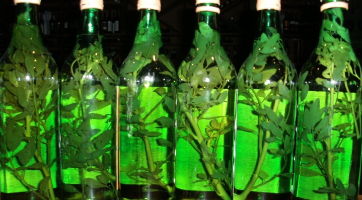 Caña con ruda es una tradición milenaria enraizada originalmente en el litoral argentino, especialmente en las provincias de Misiones y Corrientes, pero que se extendió por todo el país. La creencia dice que, cada 1º de agosto del año, hay que beber tres tragos en ayunas para obtener sus beneficios, aunque los más supersticiosos sostienen que hay que tomar siete.